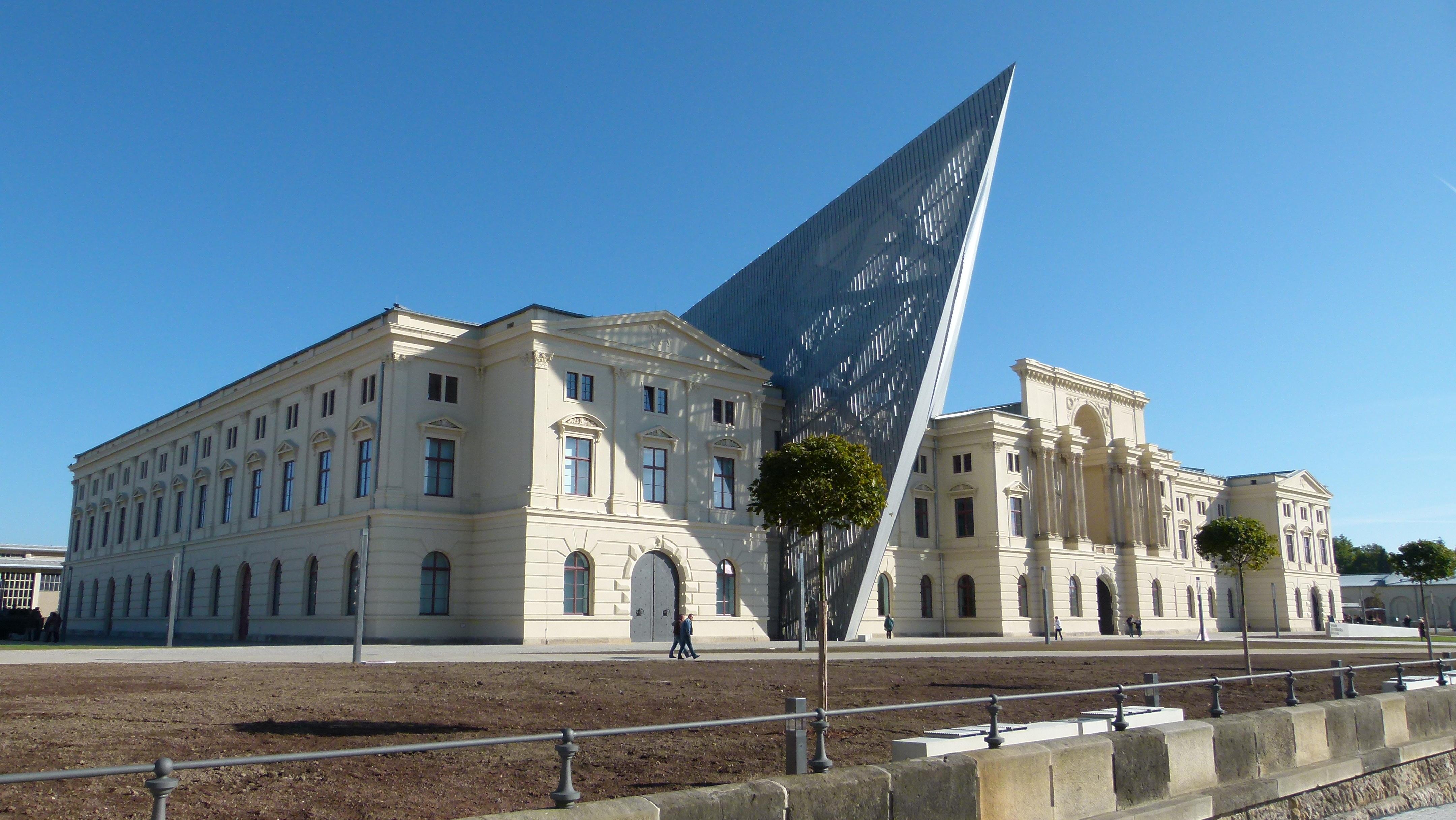 Außenansichten, Militärhistorisches Museum der Bundeswehr, Olbrichtplatz 2, Dresden